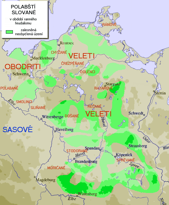 Polabian Slavs